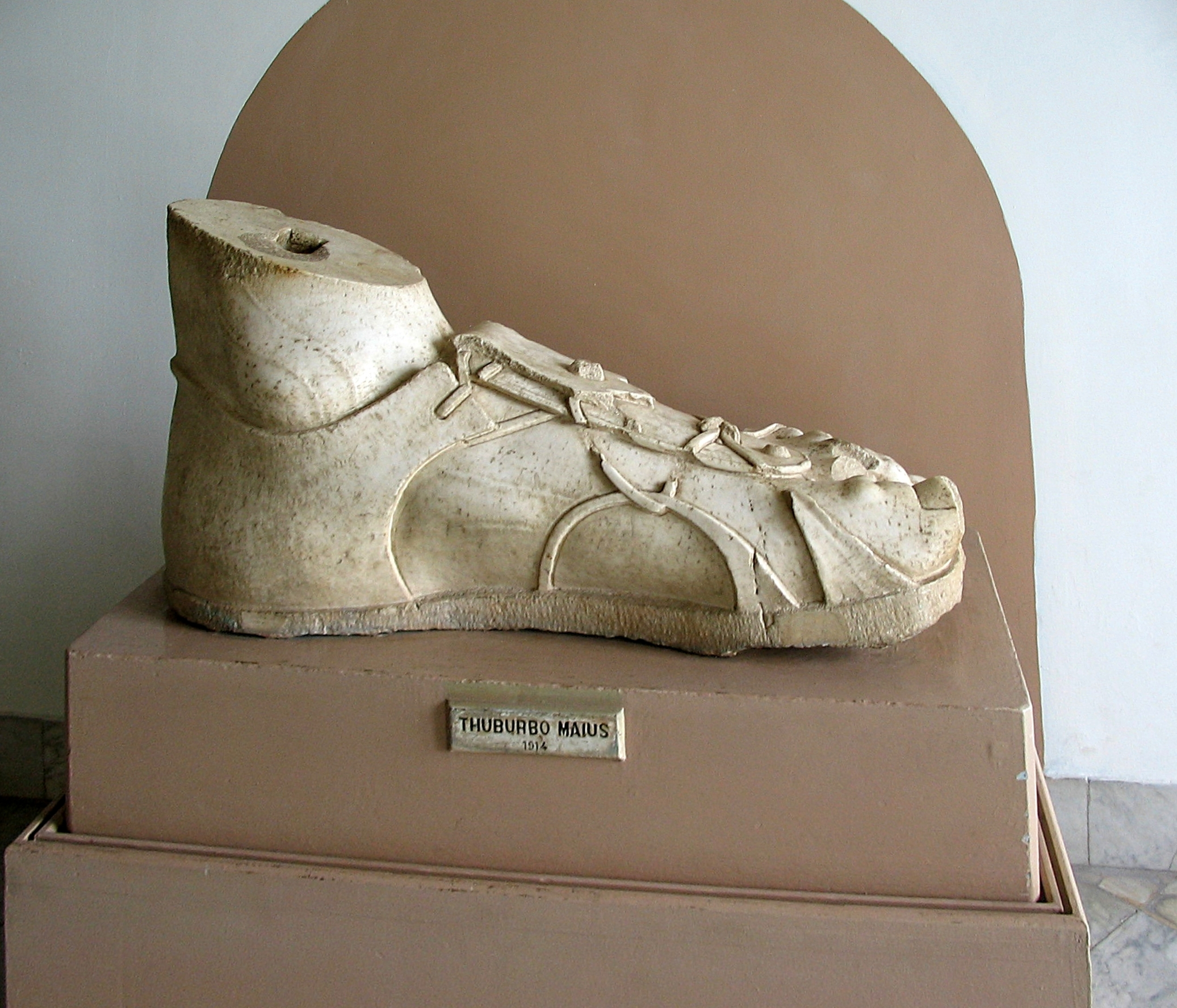 Piede colossale, scultura romana III sec., ex Museo nazionale del Bardo, Tunisi.